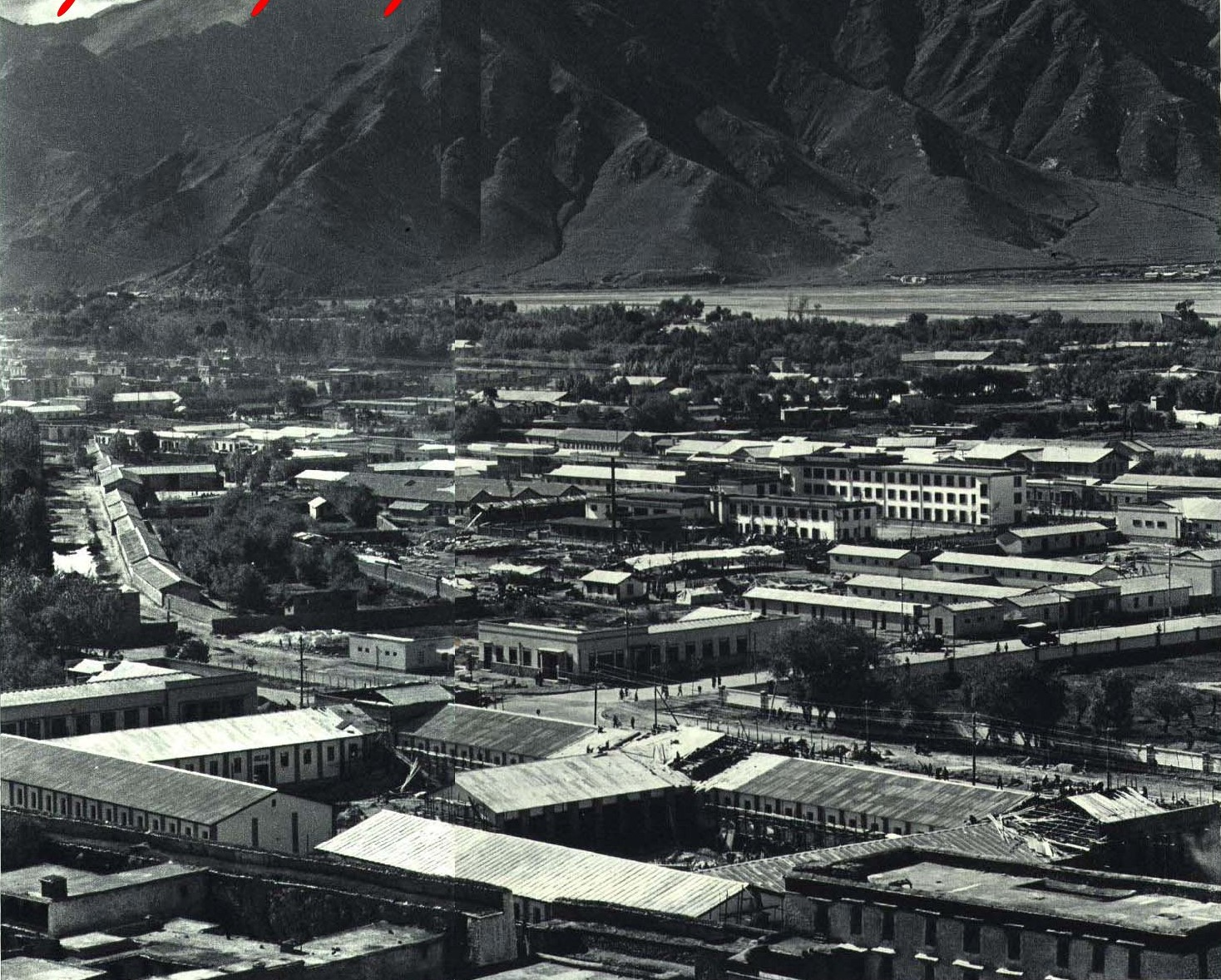 1965-11 1965 拉萨市区